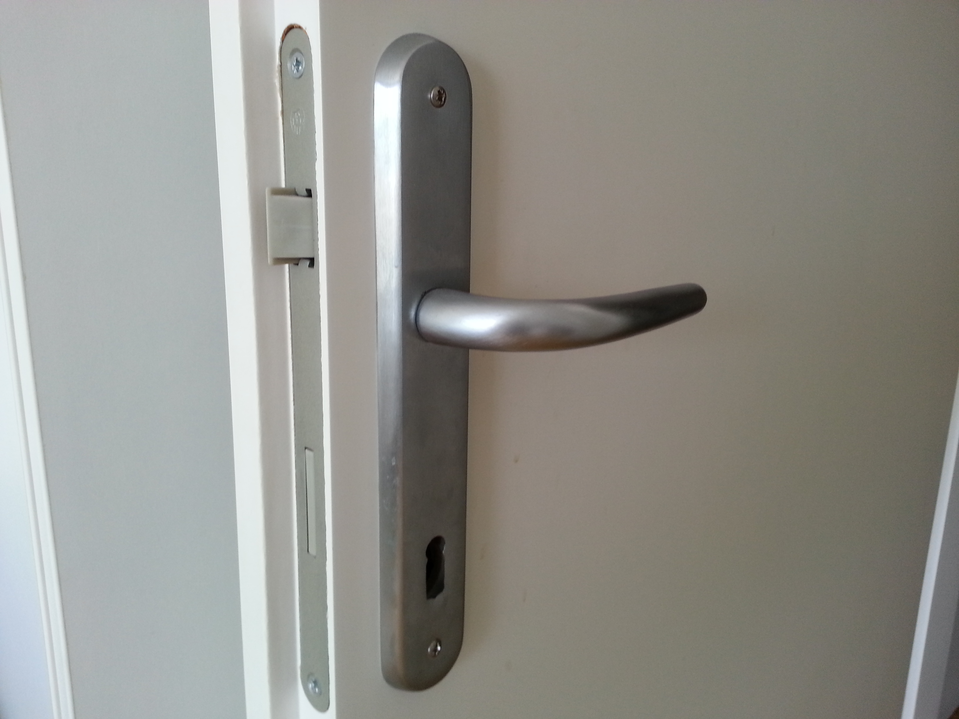 Notranja navadna ključavnica.